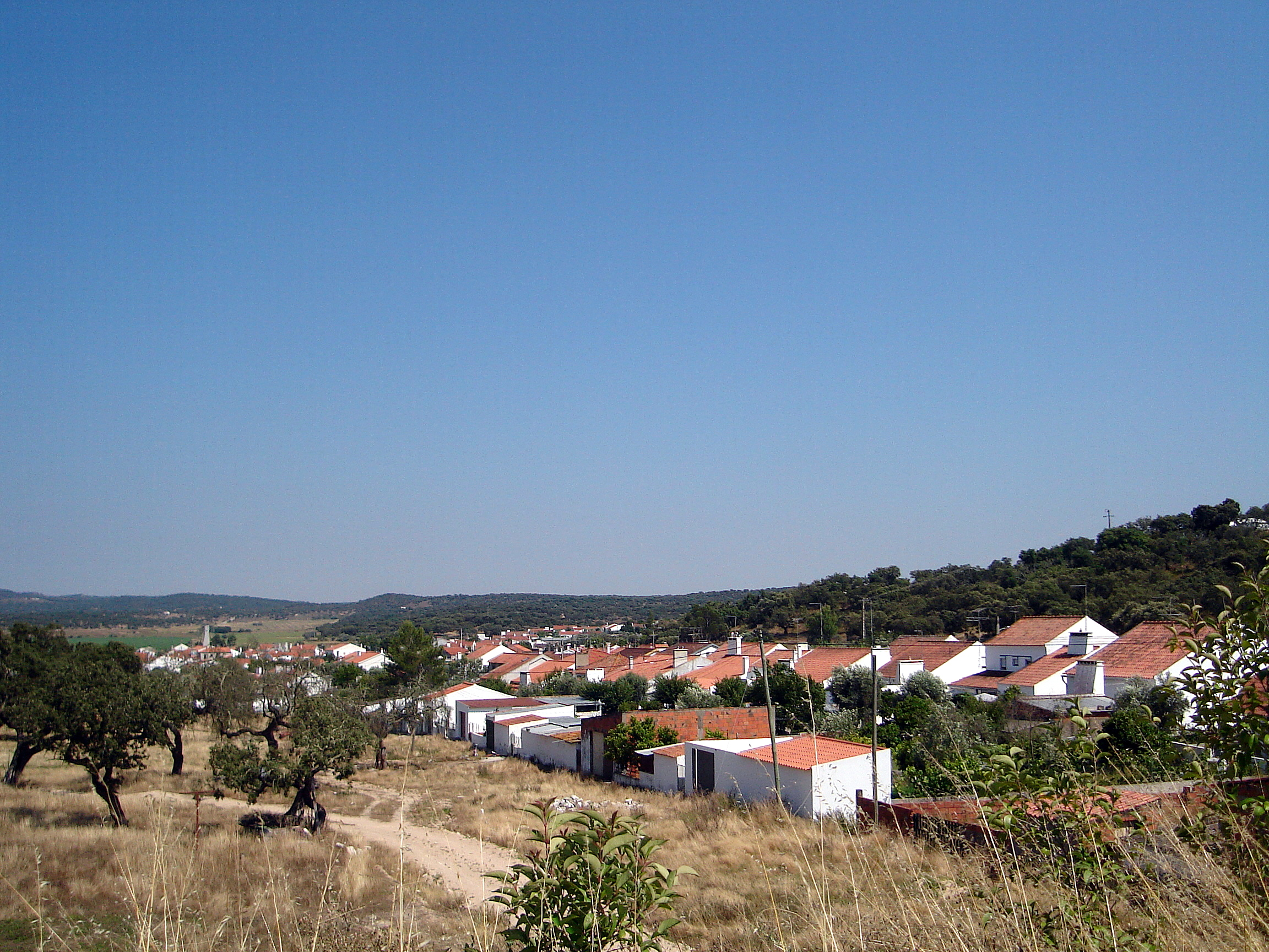 Vista Geral do Sabugueiro